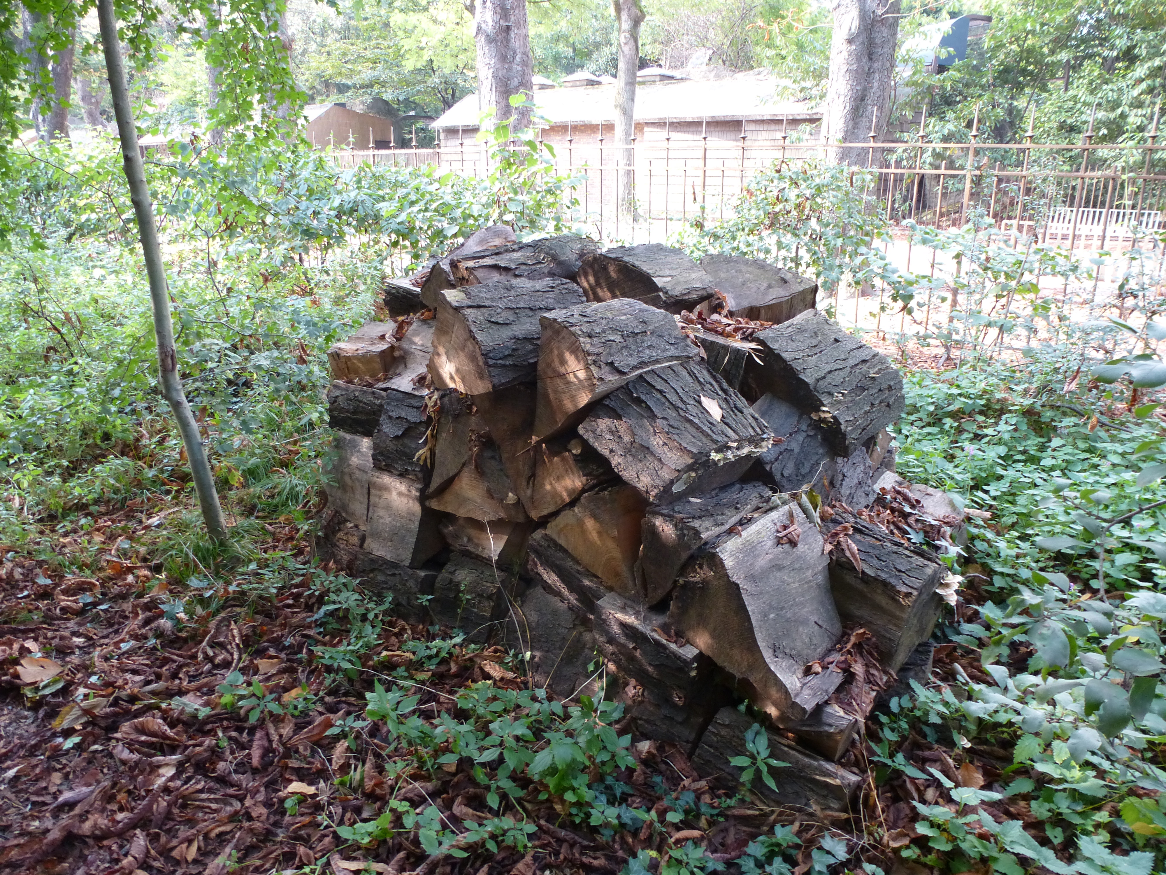 Vue du jardin écologique. Le jardin sauvage du Jardin des Plantes de Paris. France